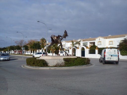 Monumento al Gallo de Morón en la entrada del pueblo.